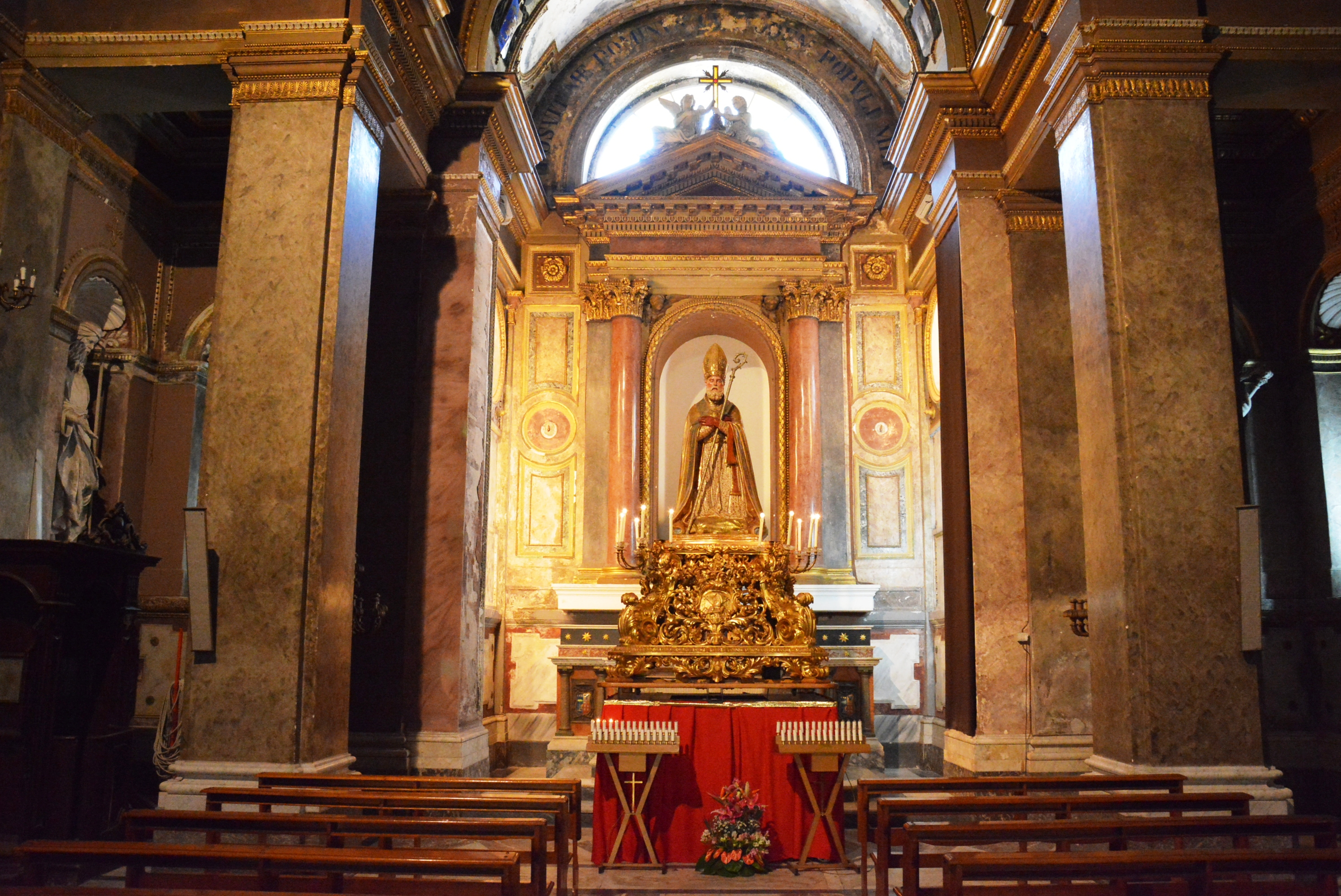 Cattedrale di Maria Santissima Assunta a Castellamma di Stabia